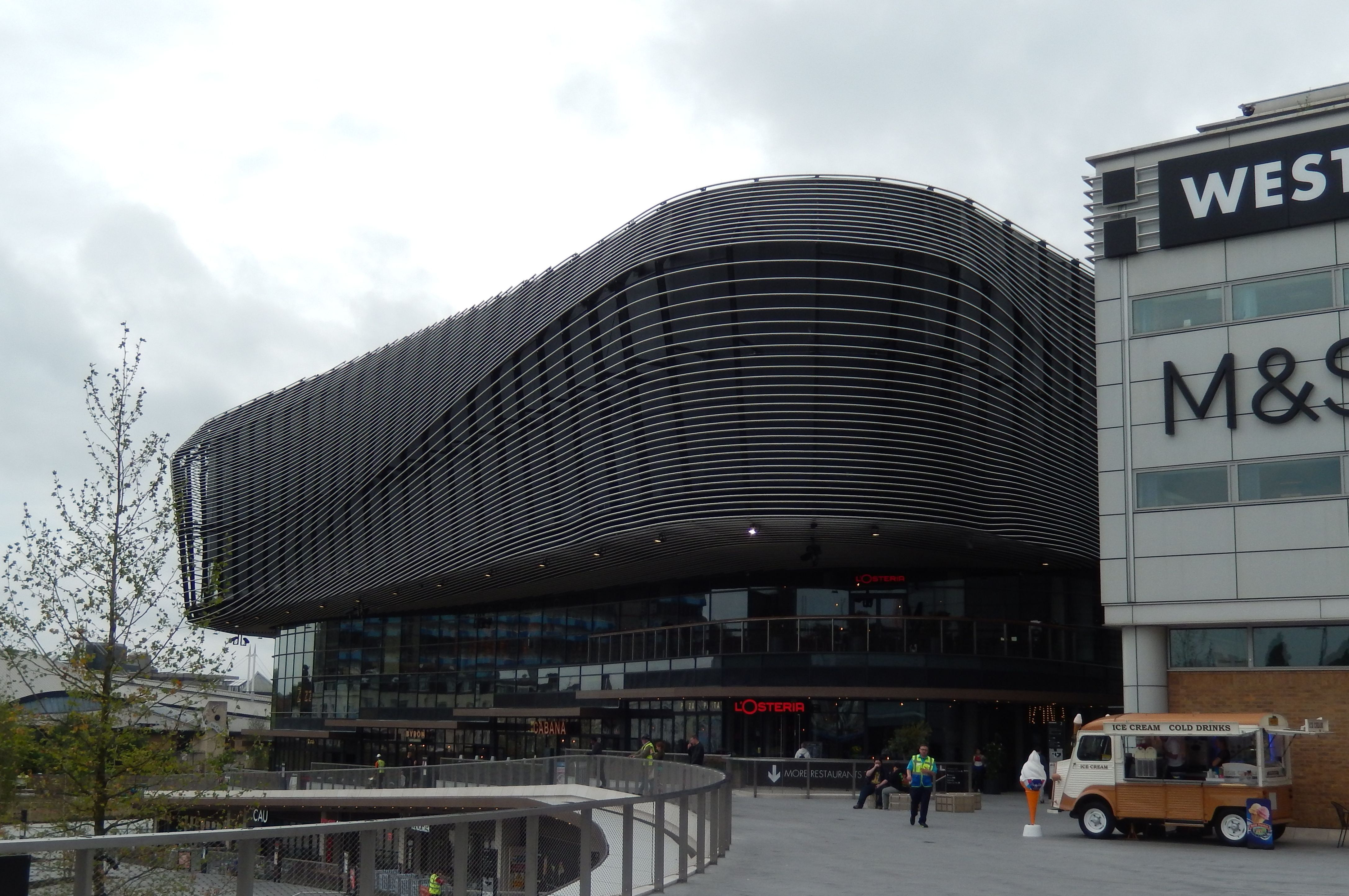 Southampton: West Quay South with L'Osteria